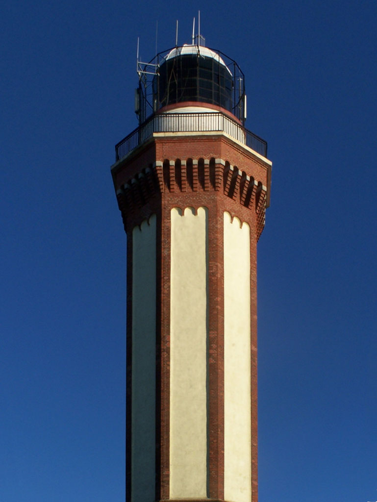 Latarnia Morska w Niechorzu